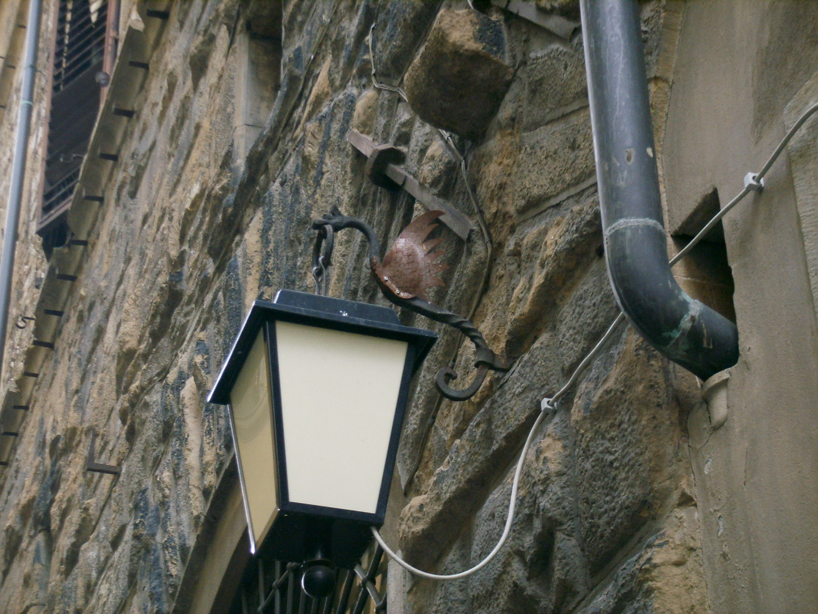 Palazzo salviati- quaratesi dettaglio